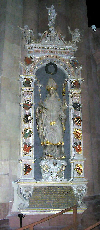 Das Grabdenkmal von Erzbischof Albrecht von Brandenburg in Mainz Quelle: Fotografie von Moguntiner vom 03.01.05 Technische Überarbeitung: --wolpertinger 07:54, 25. Mär 2005 (CET) - Original hier